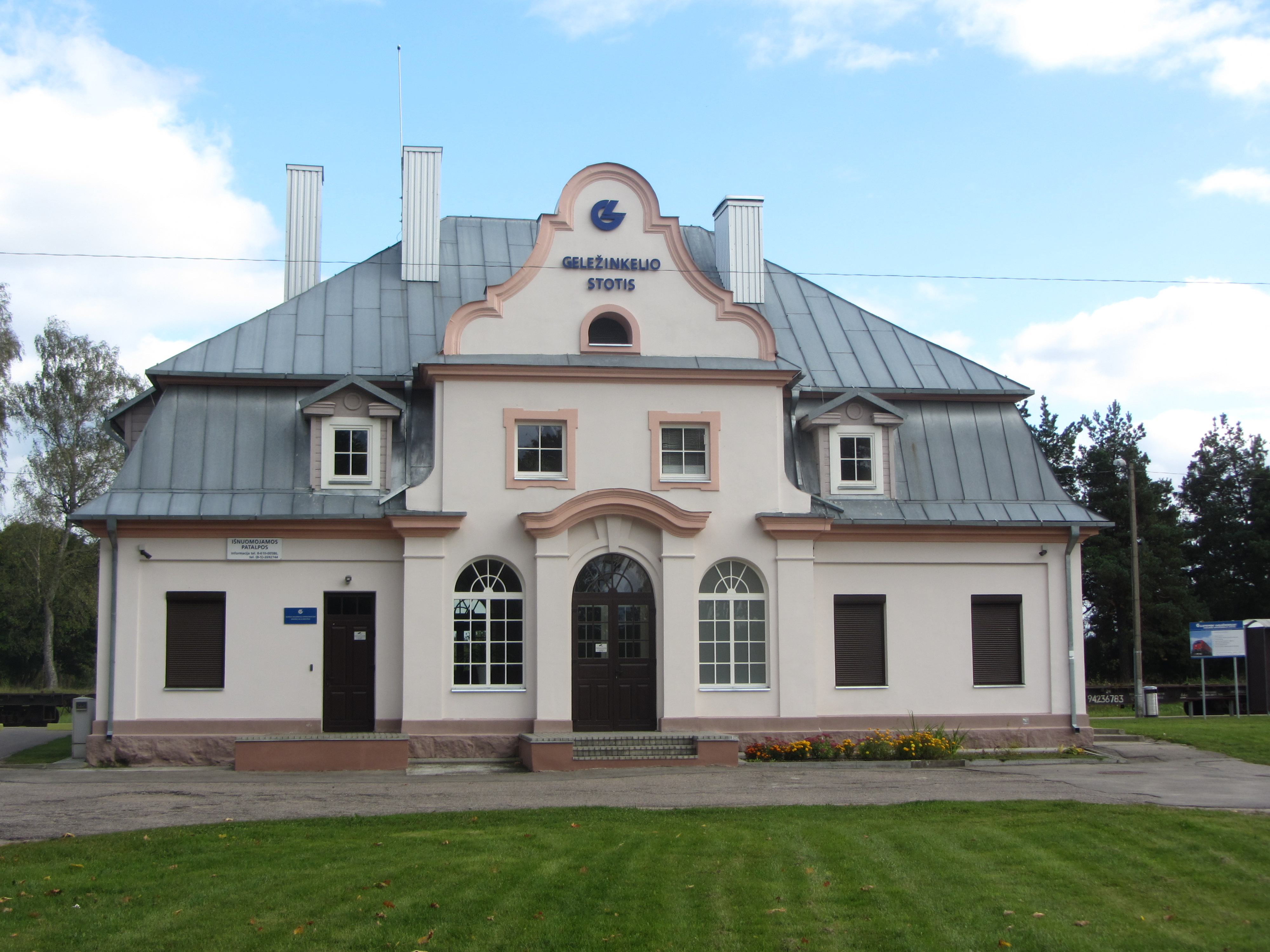 Rūdiškės, Lithuania